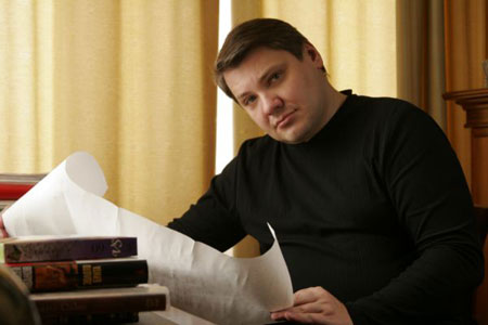 Баков, Антон Алексеевич